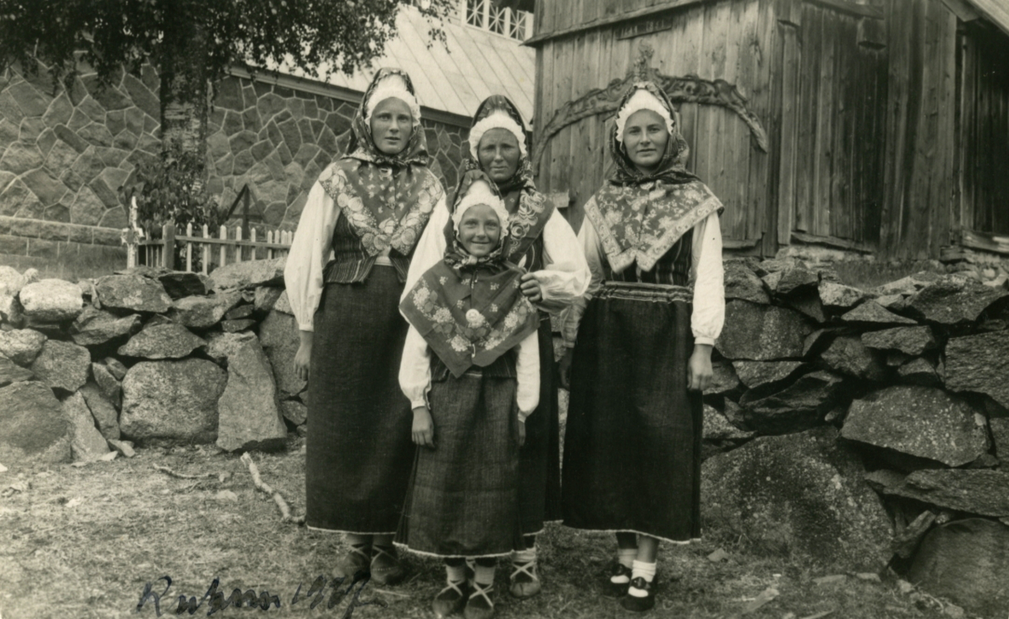 Rahvariietes Ruhnu naised 1937. aastal